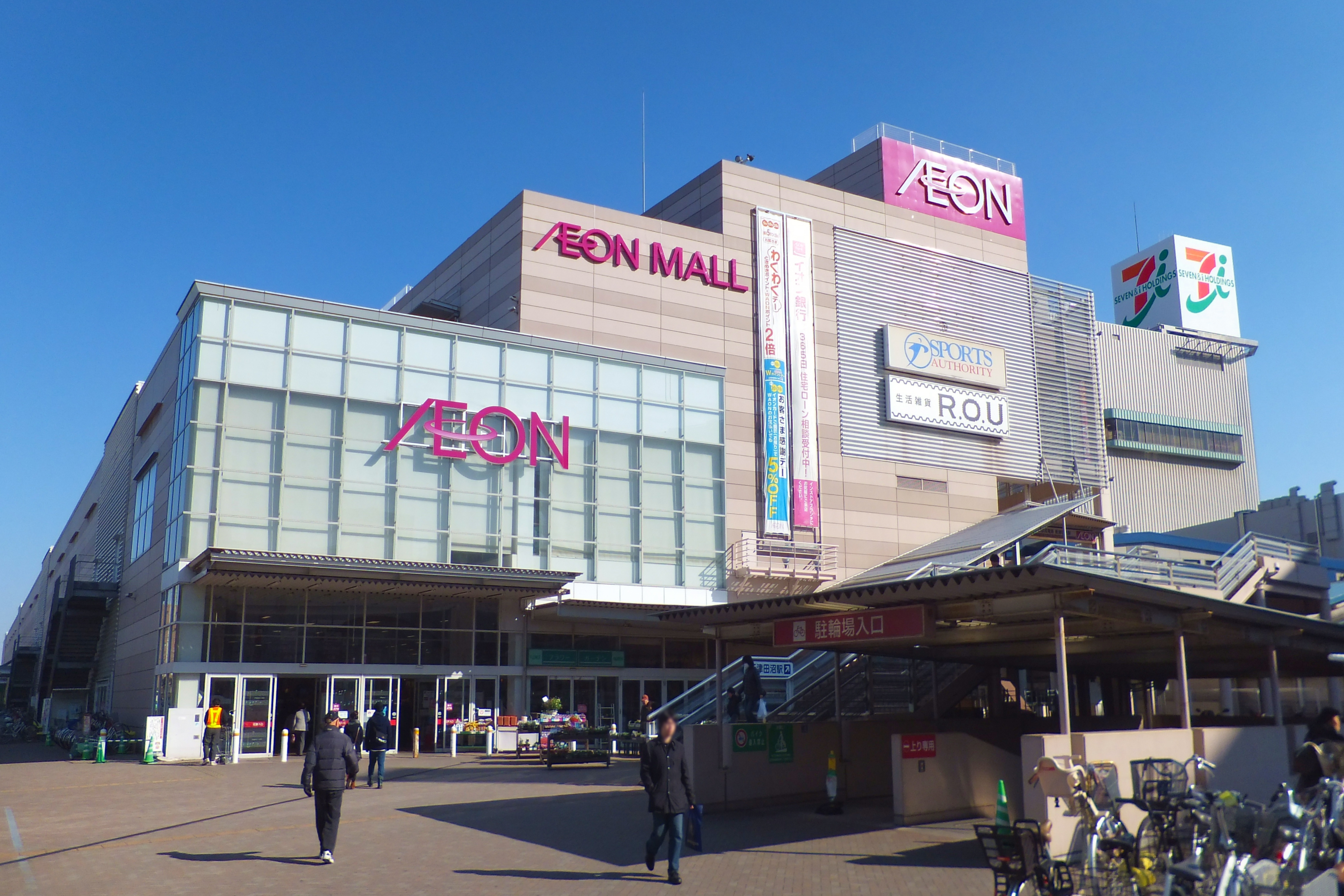 イオンモール津田沼（千葉県習志野市）